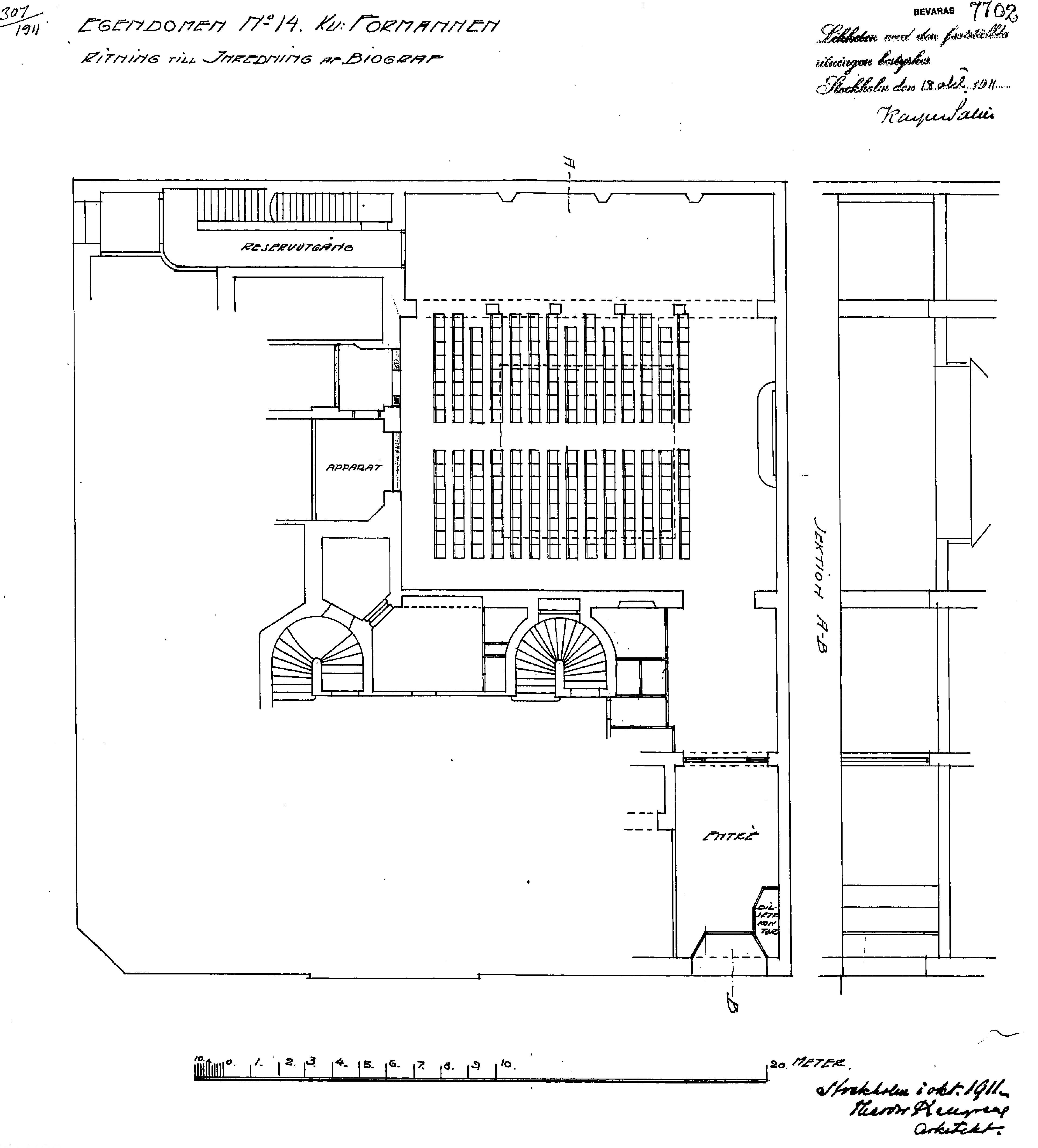 Ritning till Piccadilly (biograf)